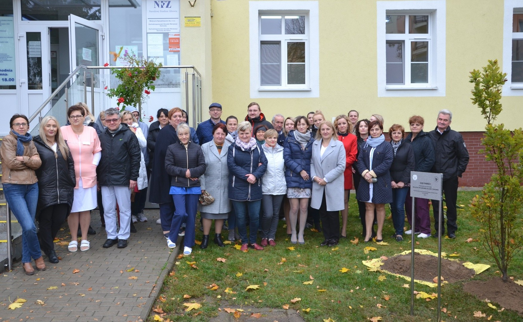 WSPL SP ZOZ Stargard